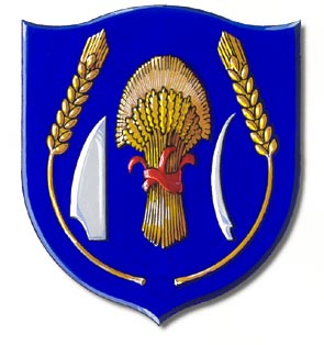 Wappen von Gemeinde Šid